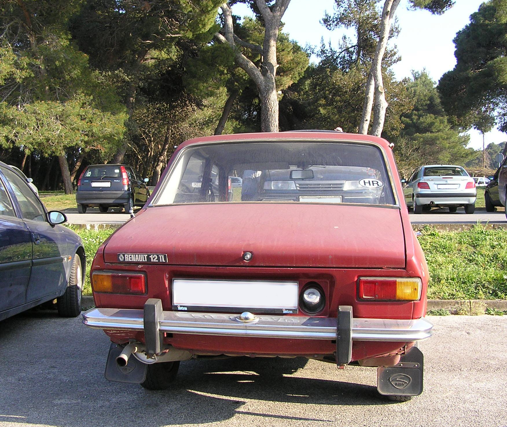 Renault 12 TL self-made